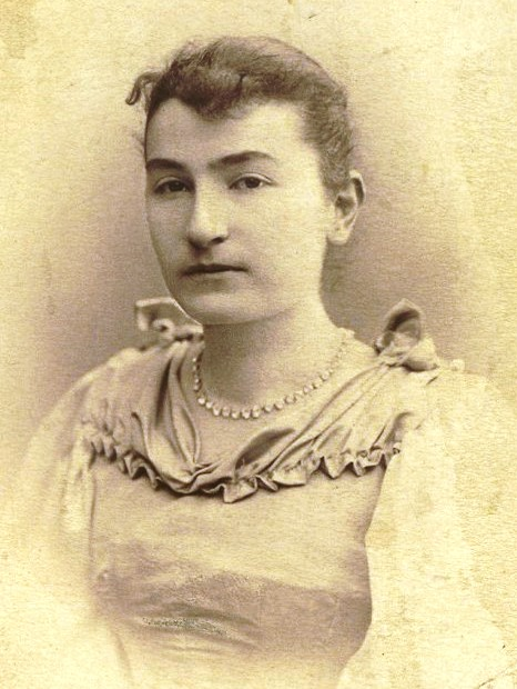 დომინიკა ერისთავი, ალექსანდრე როინაშვილის (როინოვის) ფოტოატელიე, ტიფლისი